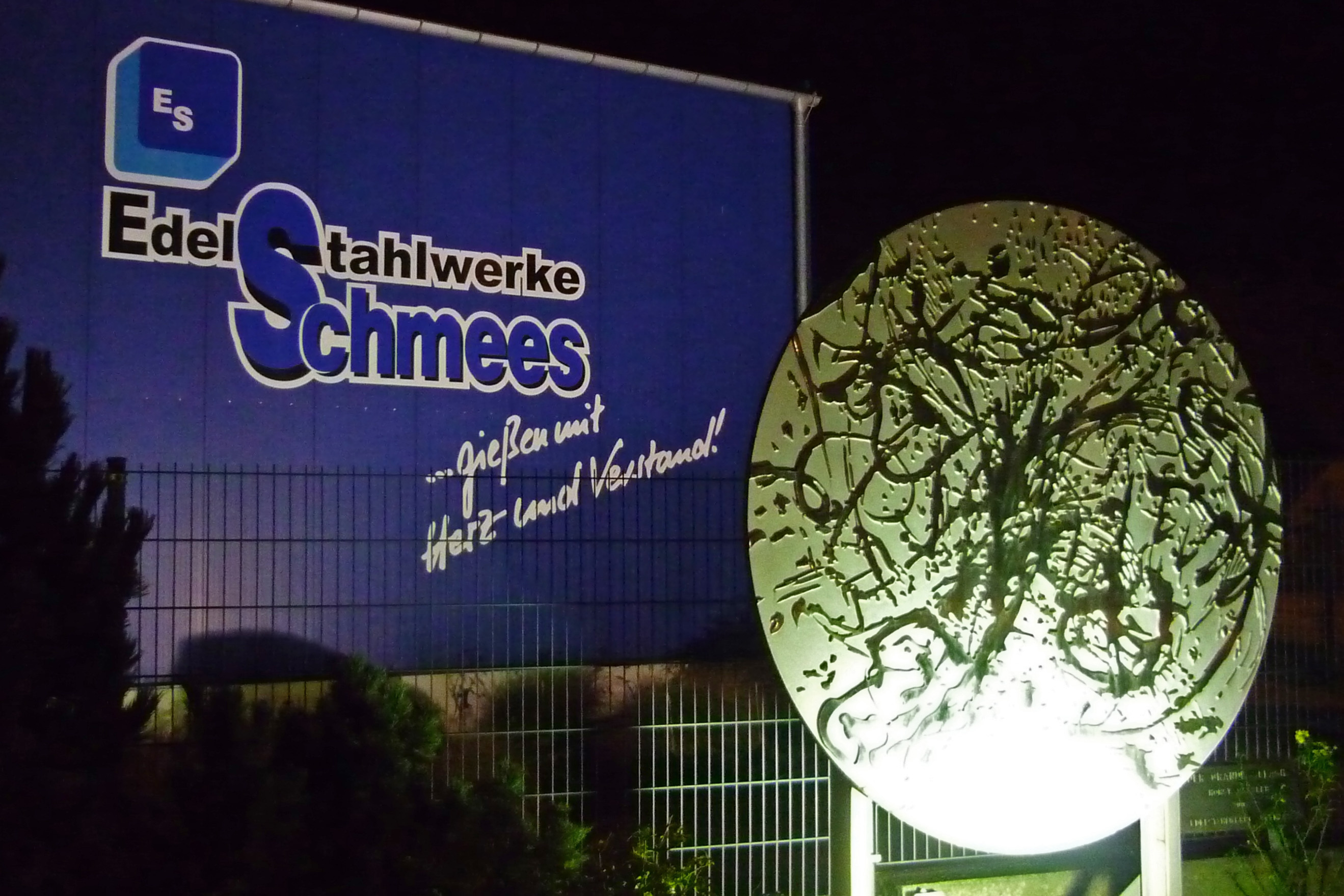 Plastik Himmelsscheibe Basteistr. 60 in Pirna-Copitz